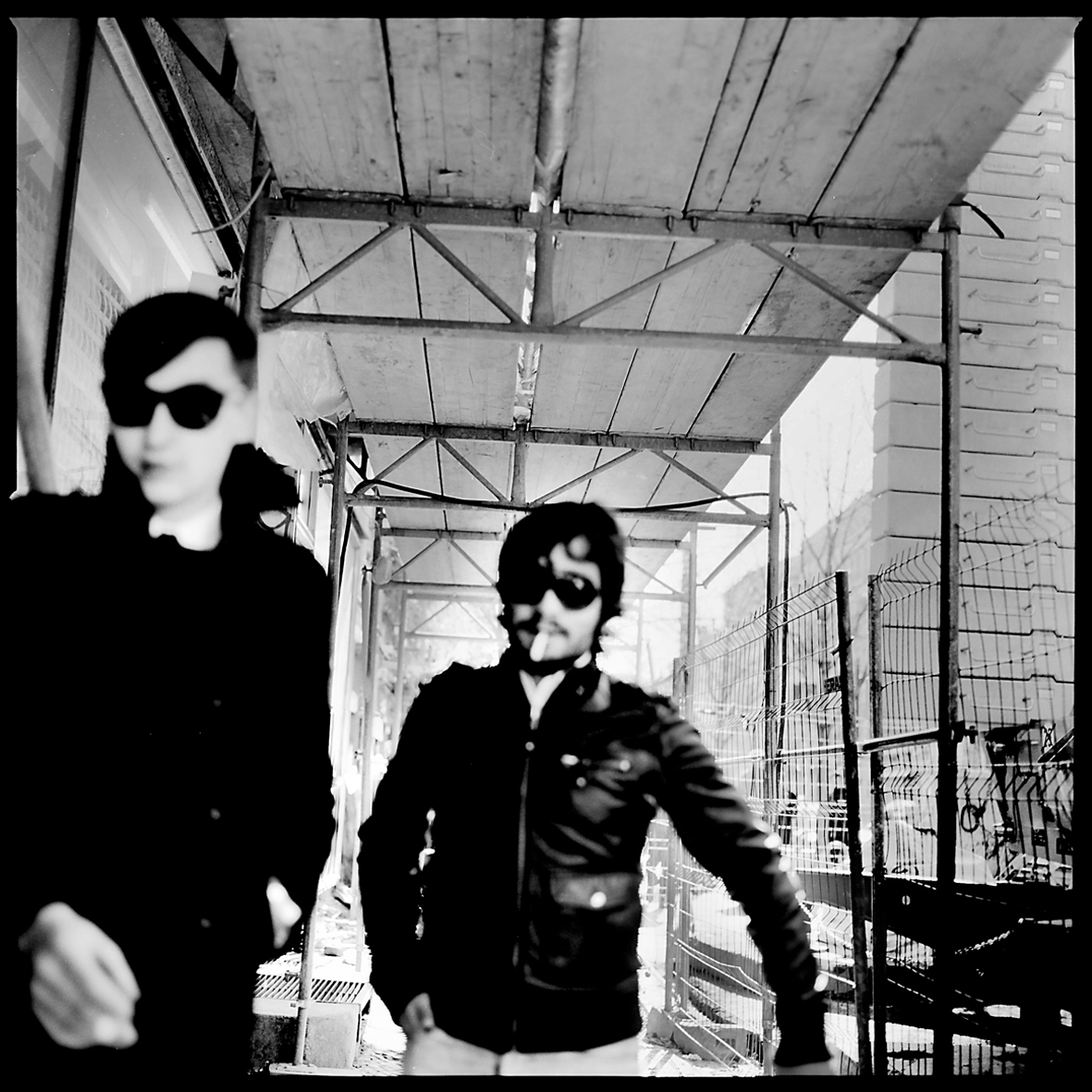 Tomáš Bican, fotografické dílo